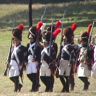 Grenadiers Photo prise par le contributeur